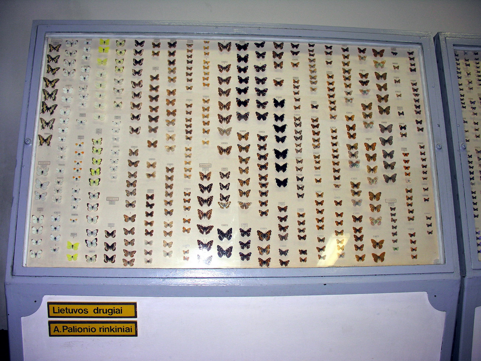 Kauno Tado Ivanausko zoologijos muziejus, 2006 m. gruodžio 2 d.